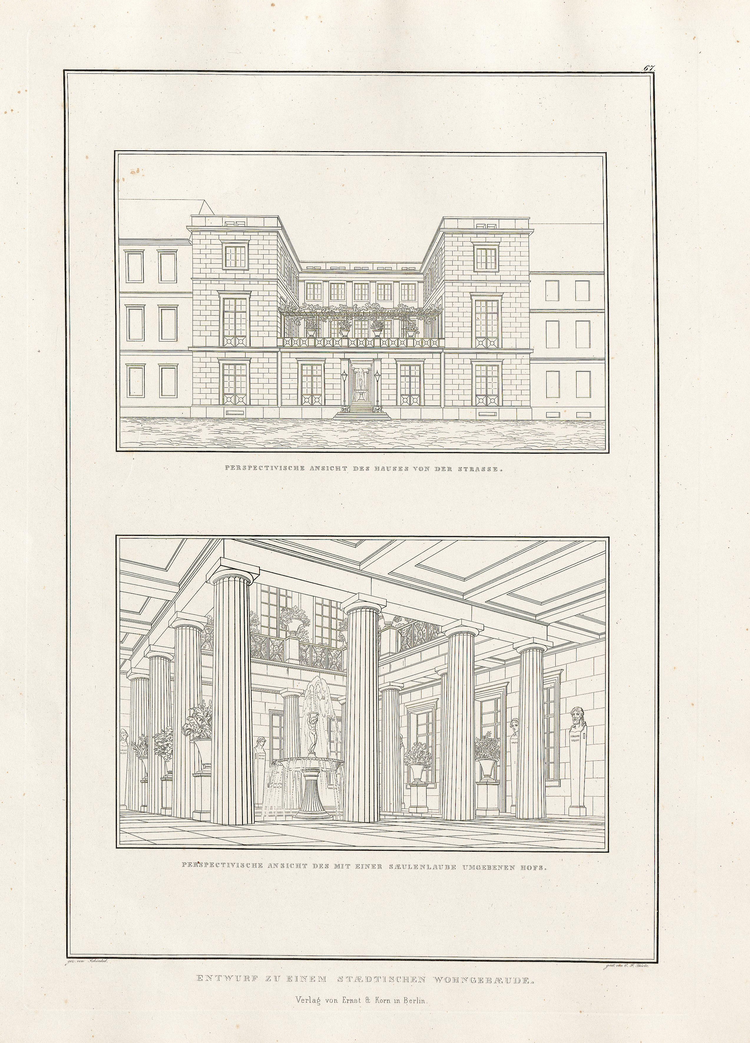 Entwurf zu einem städtischen Wohnhaus von Karl Friedrich Schinkel